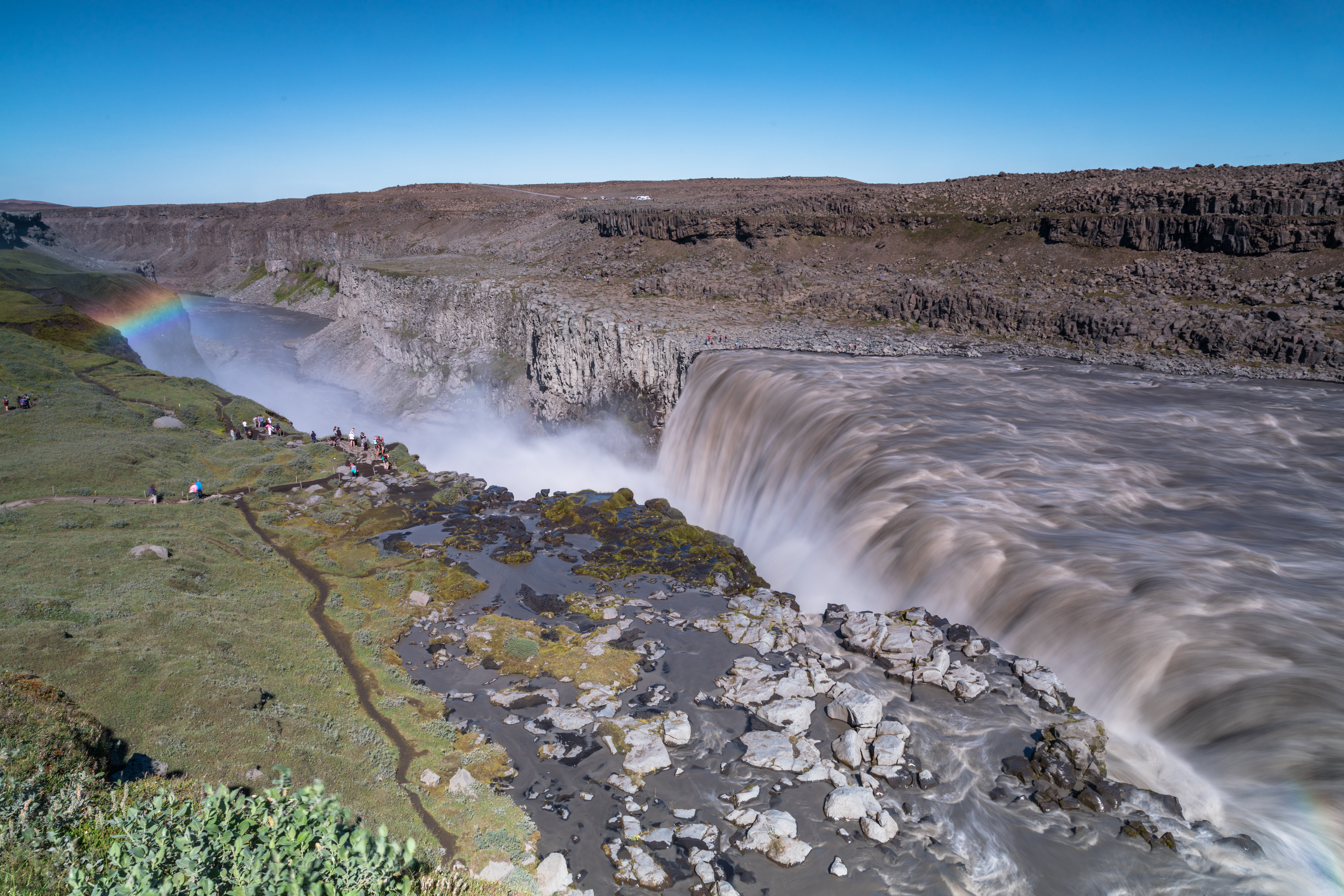 Dettifoss